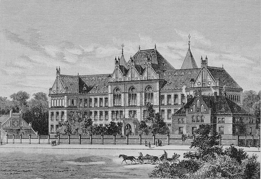 Prinz-Heinrichs-Gymnasium in Berlin-Schöneberg, Ostseite (Zeichnung 1894)